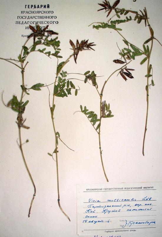 Партизанский район, окрестности посёлка Кой. Крутой каменистый склон.